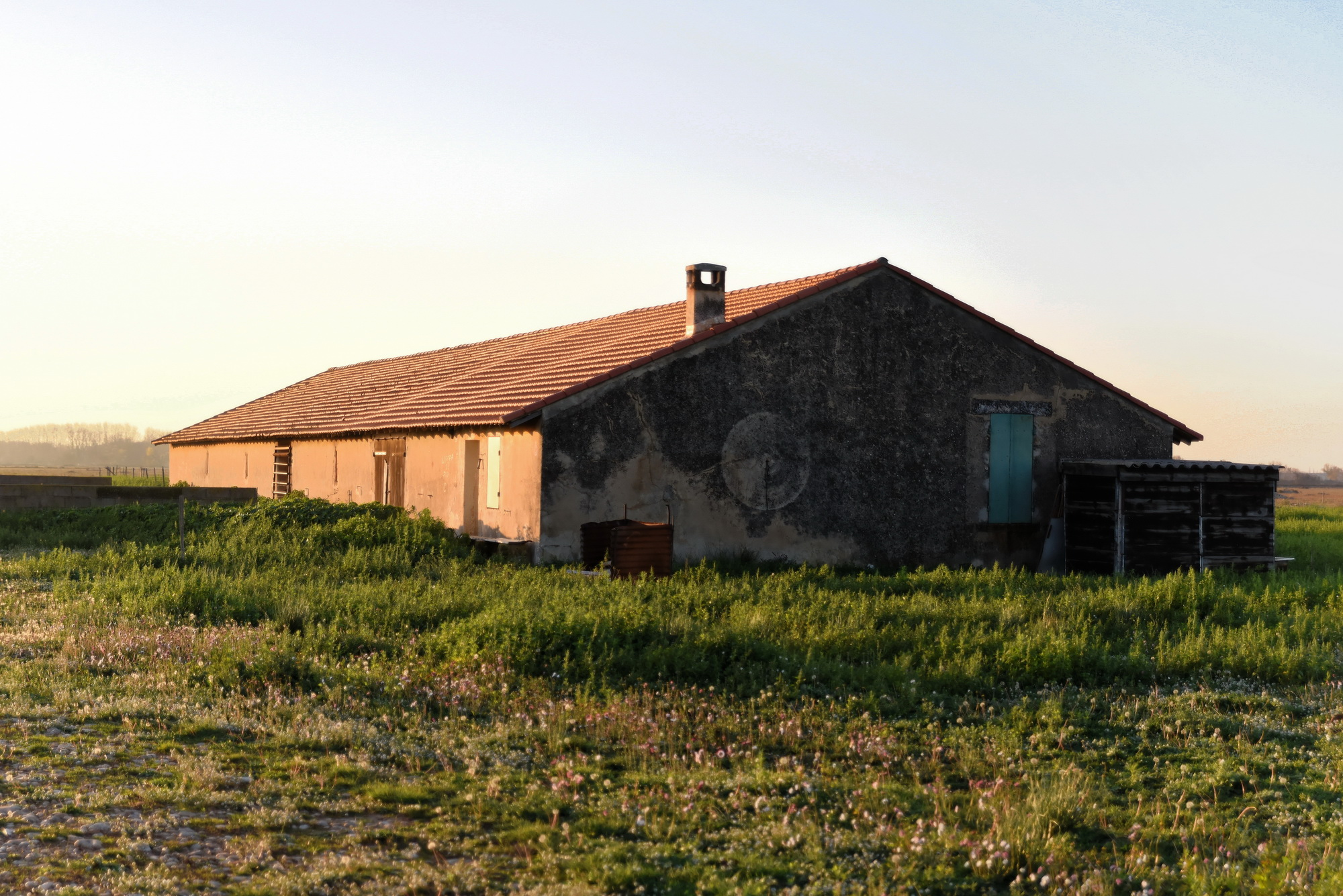 Bergerie de l'Opéra